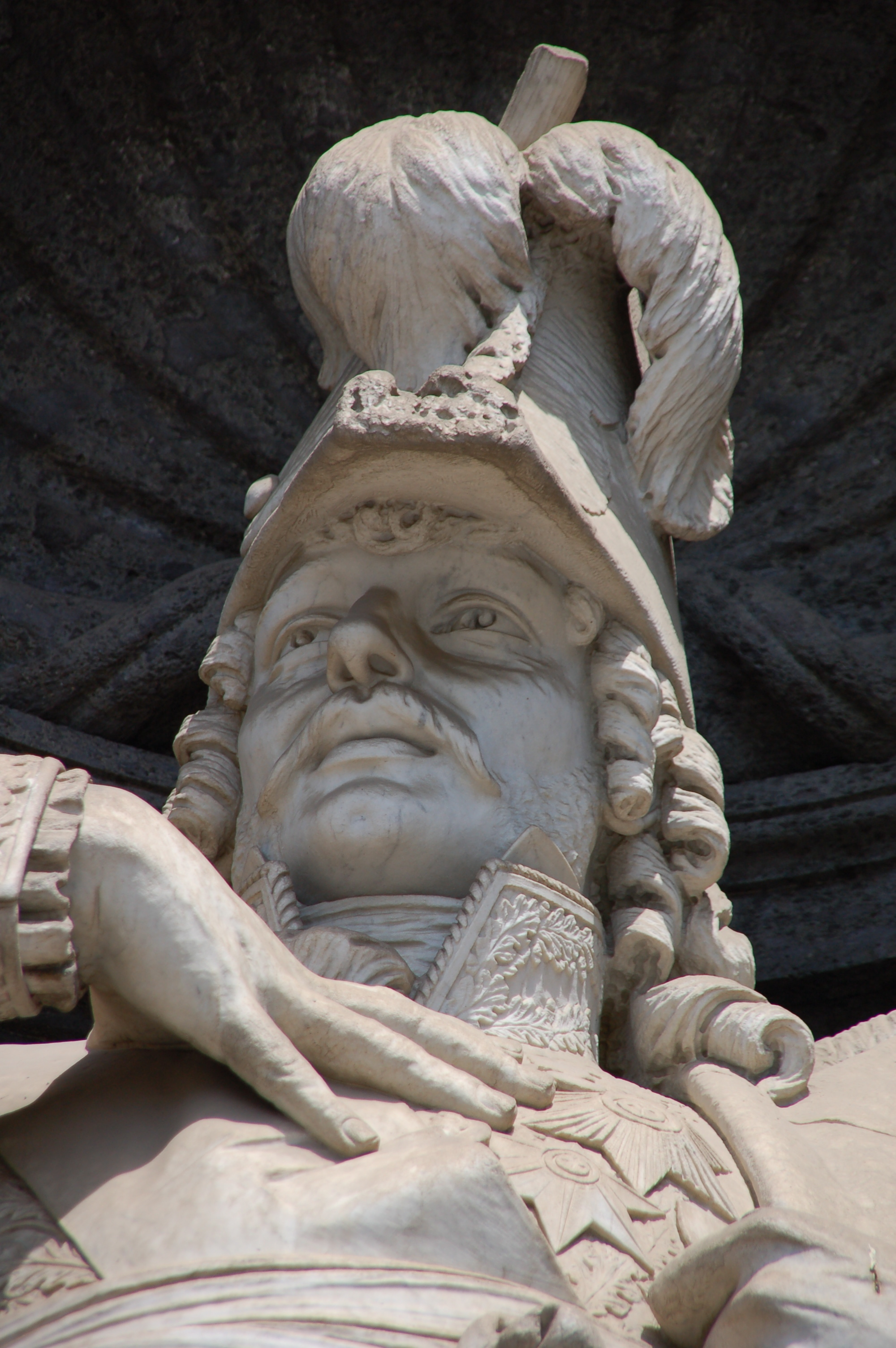 Statua sulla facciata del Palazzo Reale di Napoli: Gioacchino Murat, re di Napoli (1808-1815).